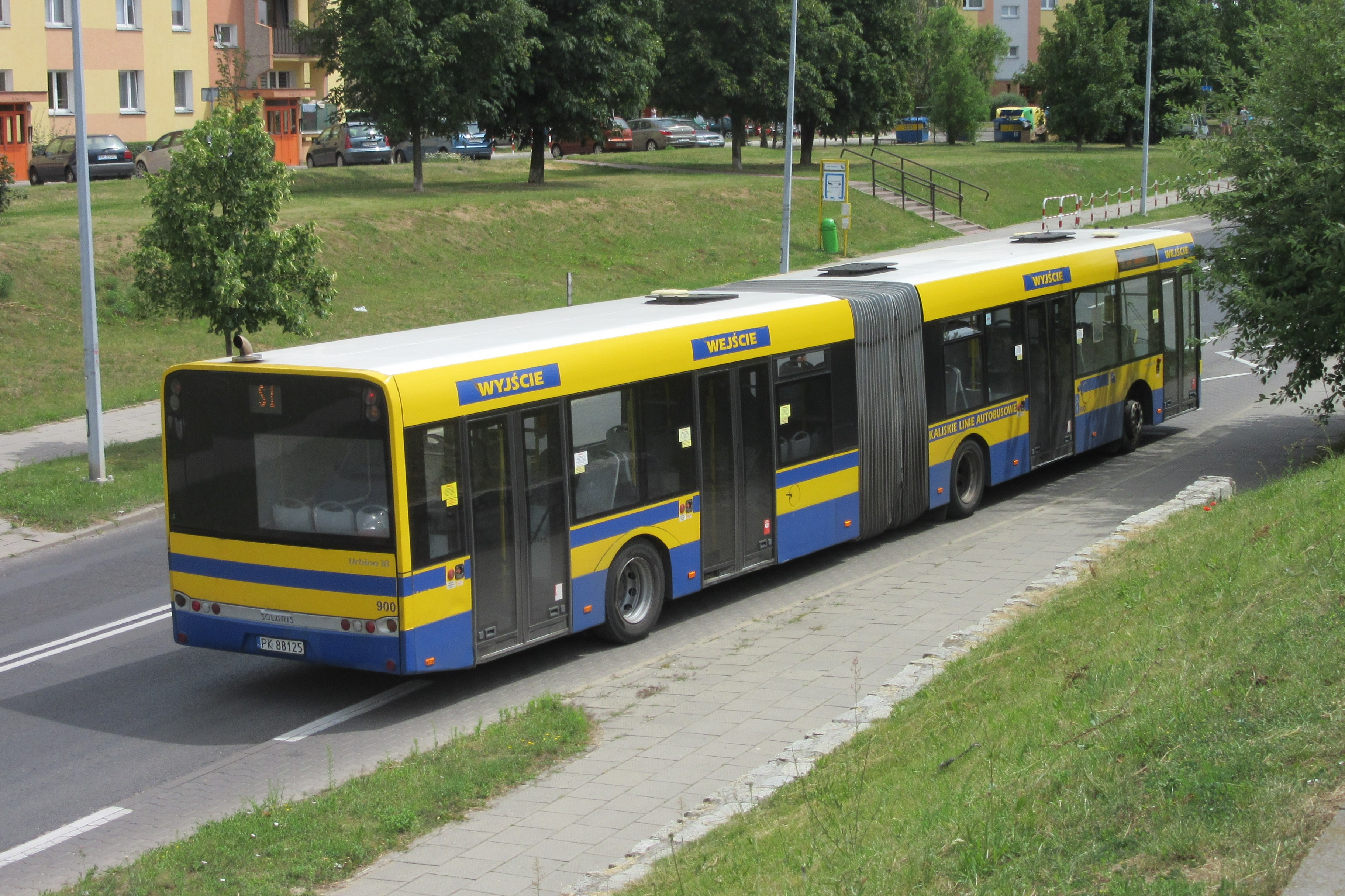 Solaris Urbino 18 Kaliskich Linii Autobusowych na ul. Hanki Sawickiej (ob. Wyszyńskiego) w Kaliszu